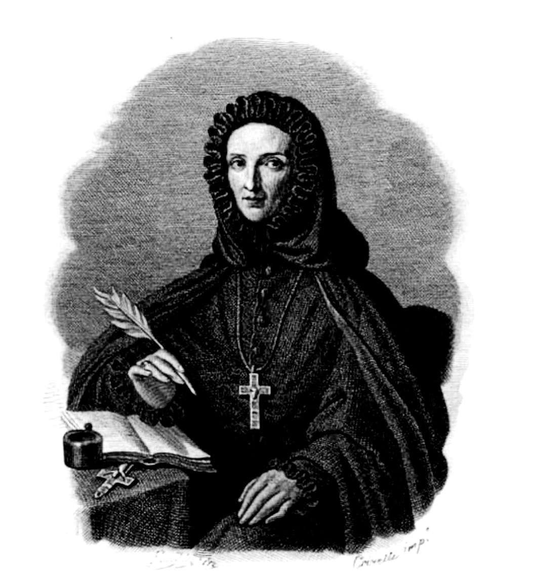 Sainte Thérèse Verzeri